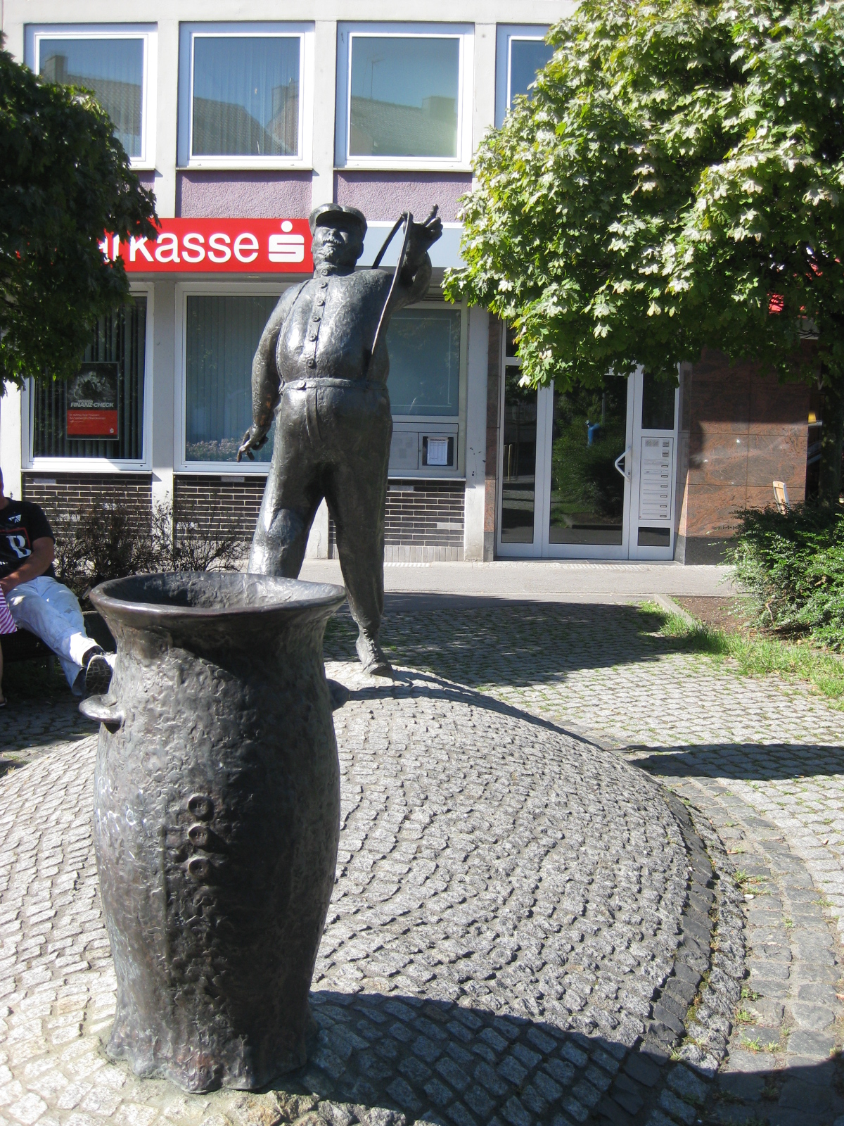 Denkmal beim Bürgerhaus im Stolberger Stadtteil Büsbach